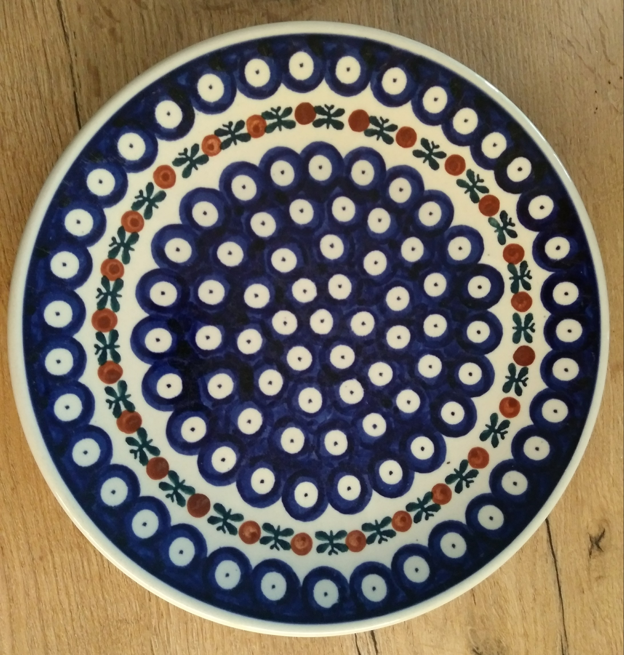 Talerz z Ceramiki Bolesławieckiej